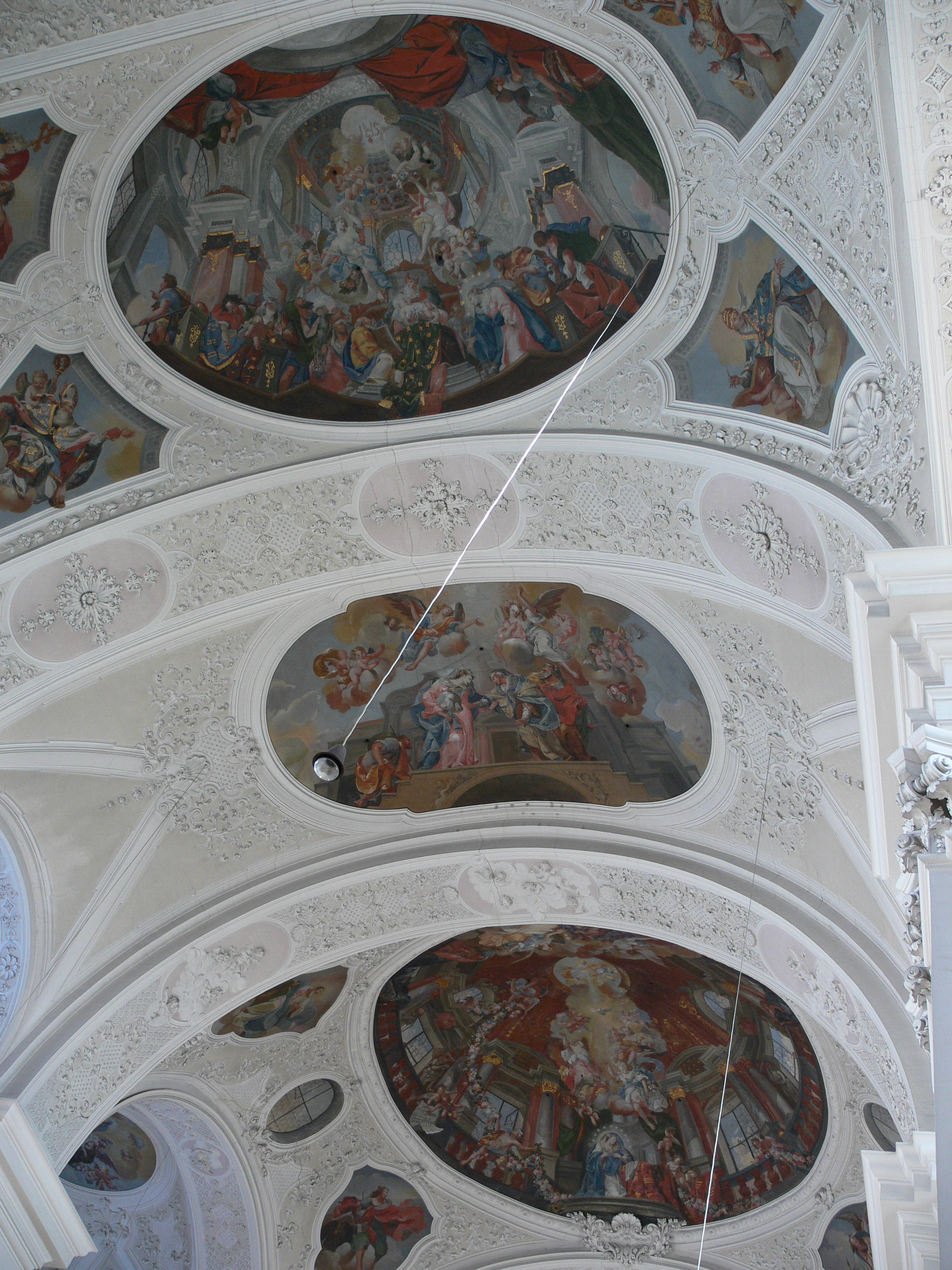 Ravensburg, ehem. Kloster Weißenau, ehem. Klosterkirche, Vierungs- und Langhausdeckengemälde von Jacob Carl Stauder (Öl auf Putz, kein Fresko), 1719